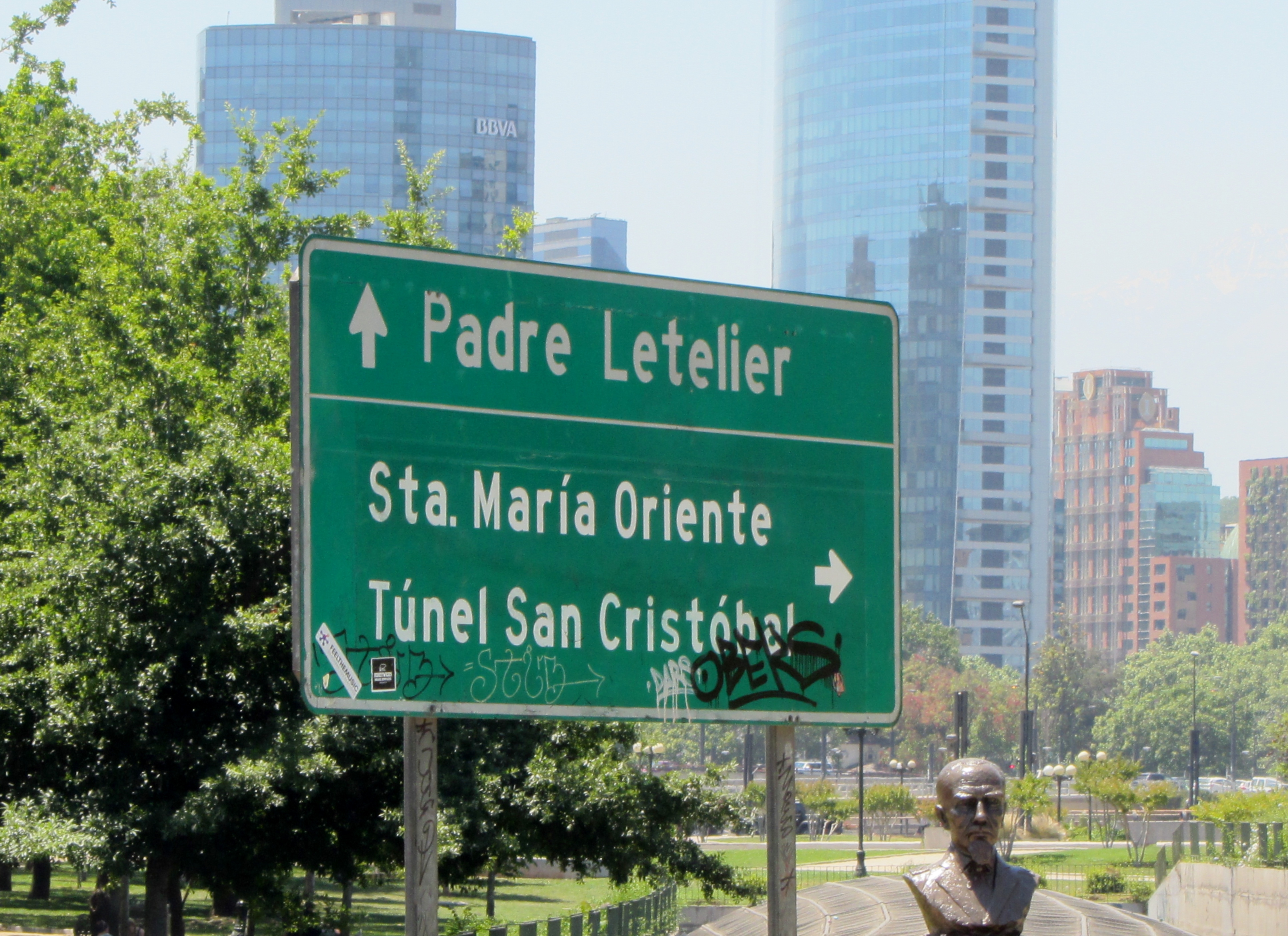 Busto del general Eloy Alfaro en el parque República del Ecuador, Providencia, Santiago de Chile.